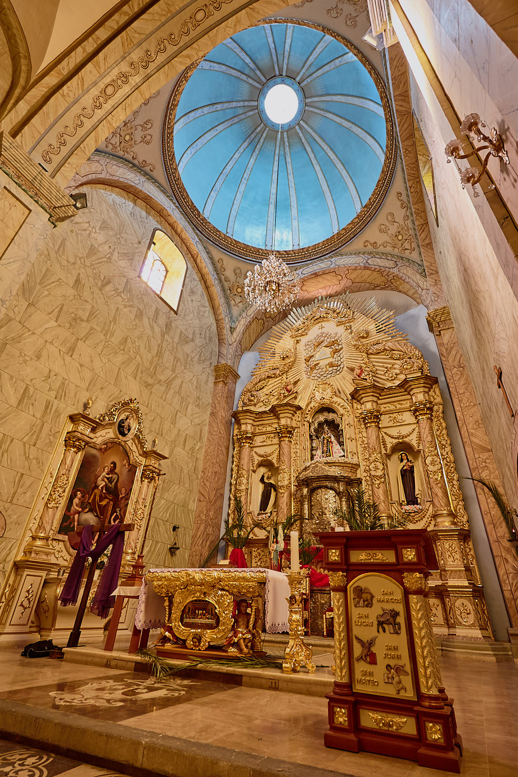 Iglesia y Convento de Santa Teresa This medium shows the protected monument with the number C/00-008 in Bolivia.